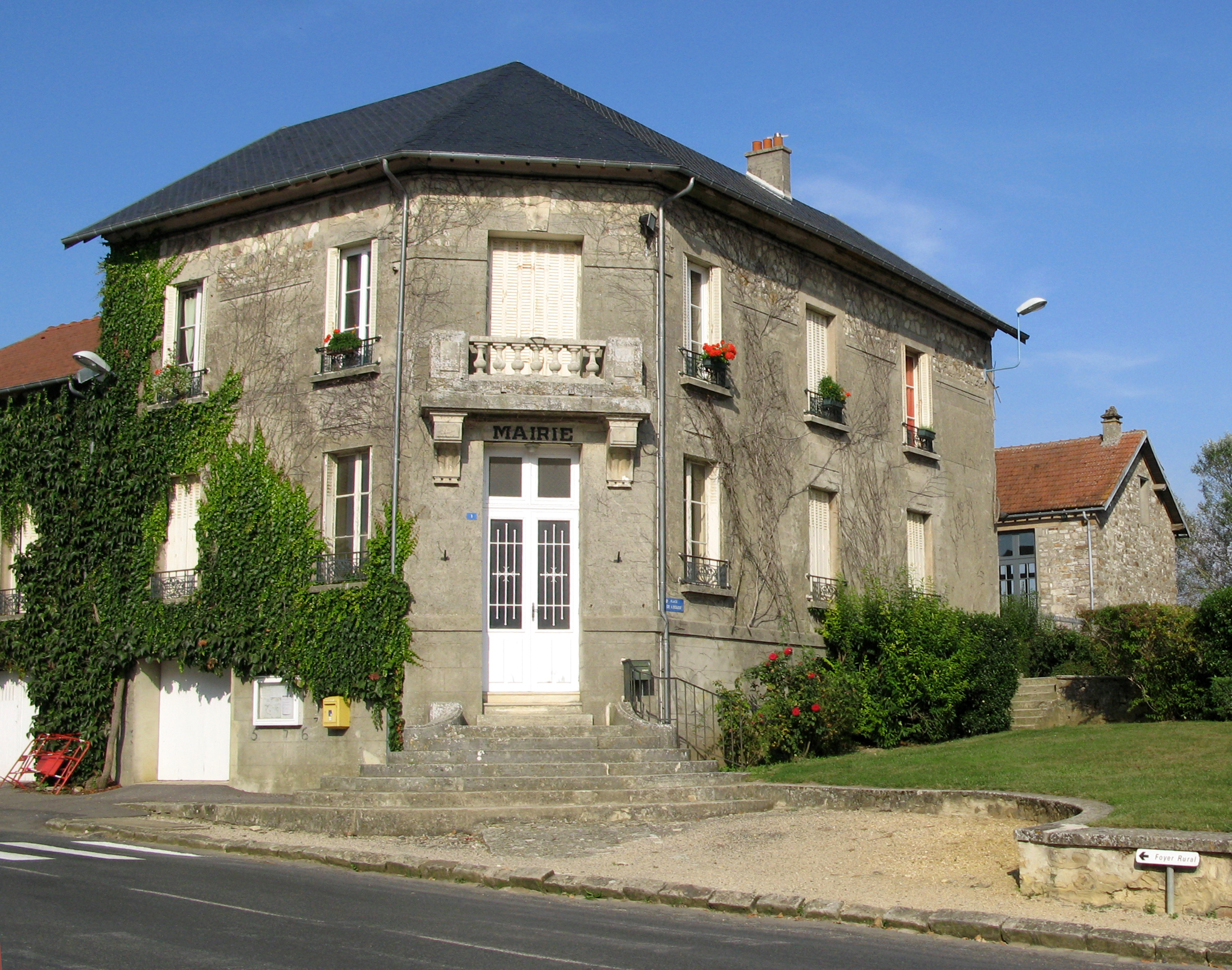 Chouy (Aisne, France) - La Mairie. . .